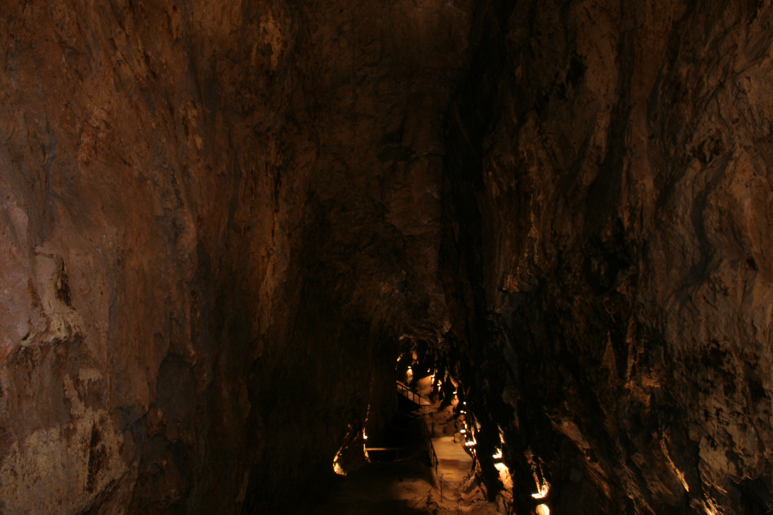 En av strossene i gruvene på Blaafarveværket.